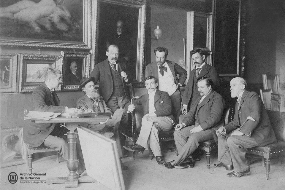 En la Sociedad Estímulo de Bellas Artes, de izquierda a derecha, los pintores Eduardo Schiaffino, Eduardo Sívori, Ángel Della Valle, Ernesto de la Cárcova, Lucio Correa Morales, Augusto Ballerini y Augusto Boncotti,1893 Documentos fotográficos. Inventario 45579